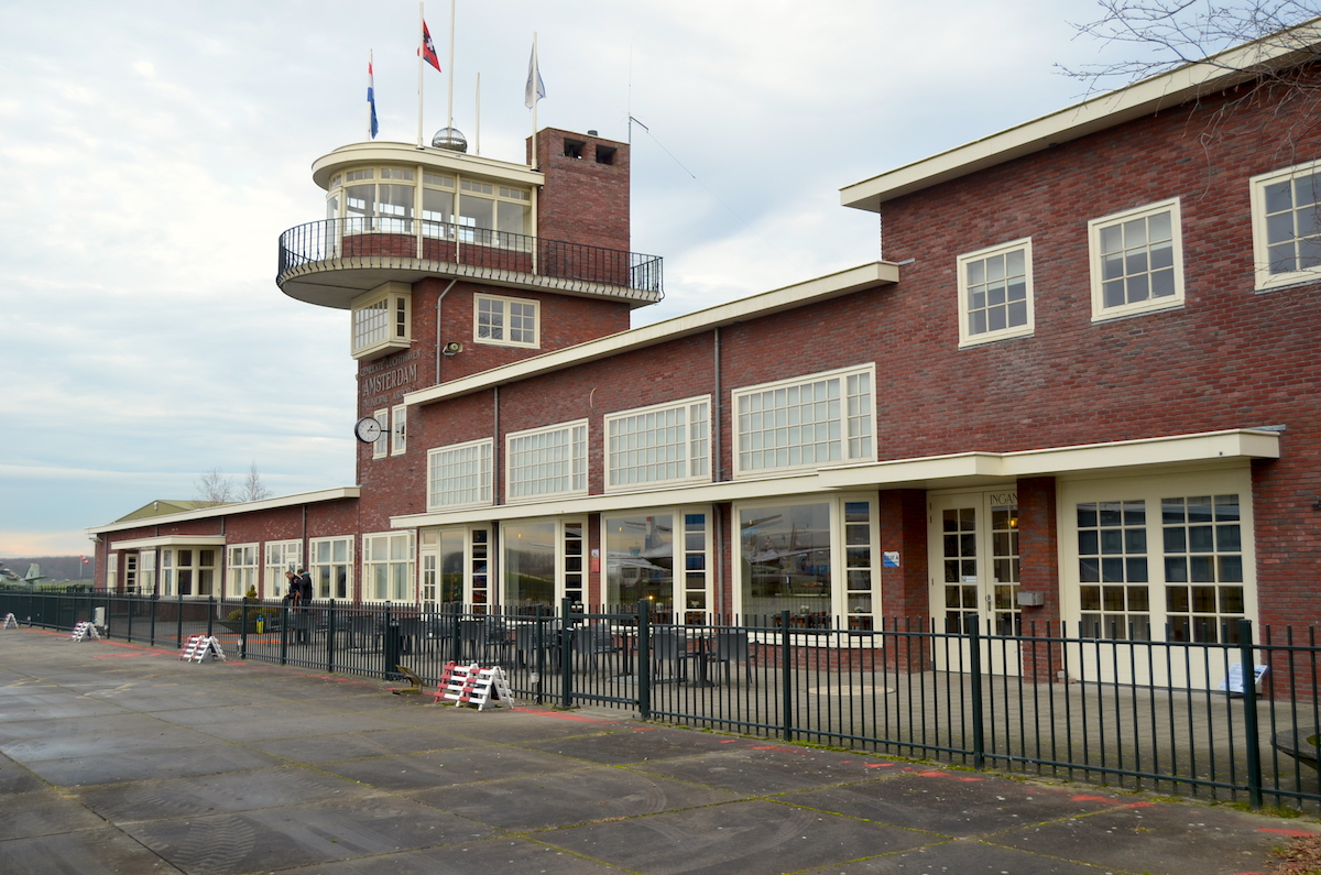 Aviodrome Lelystad. Luchthavengebouw exterieur. Foto: Erik Swierstra.